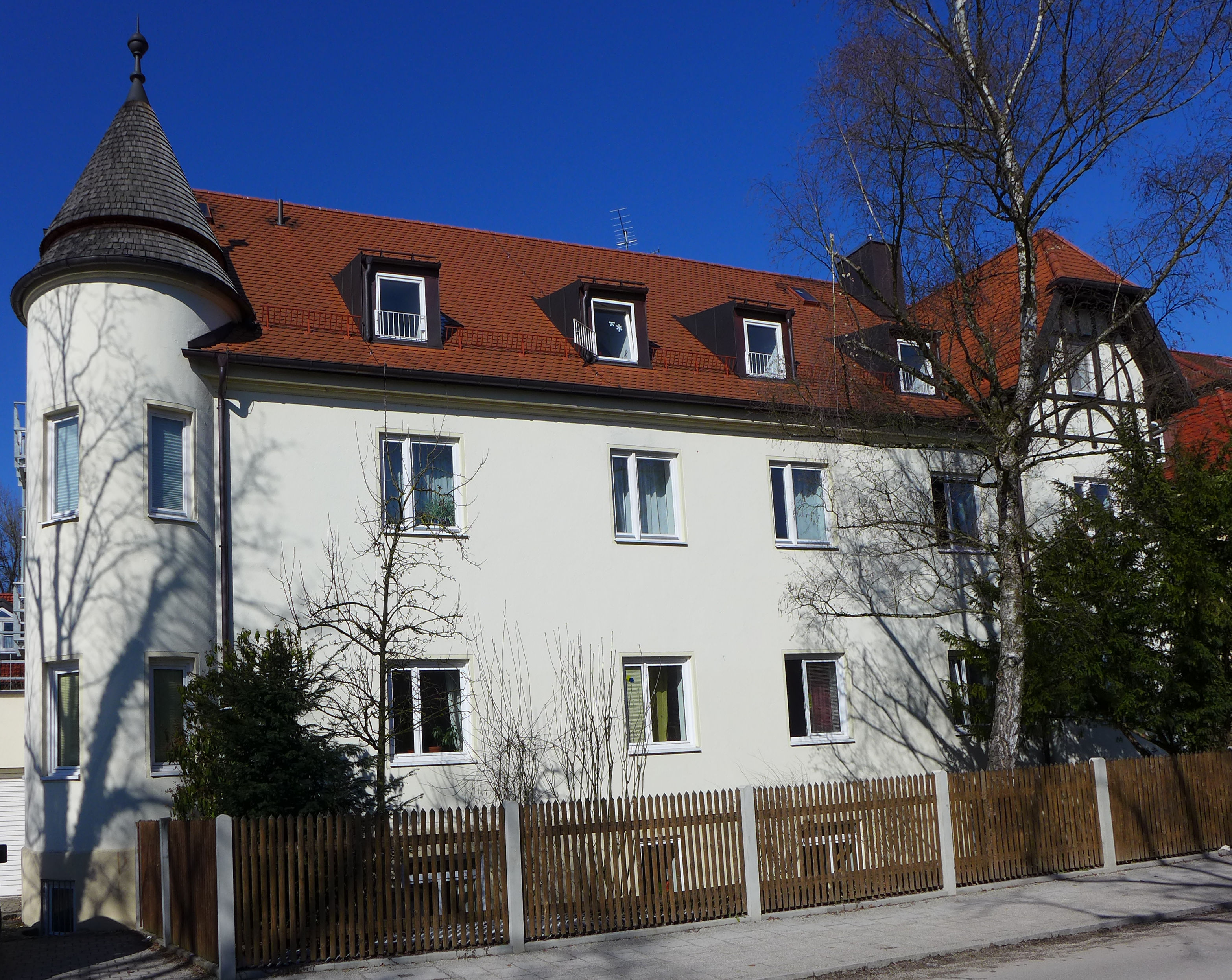 Oselstr. 27 29 31, München